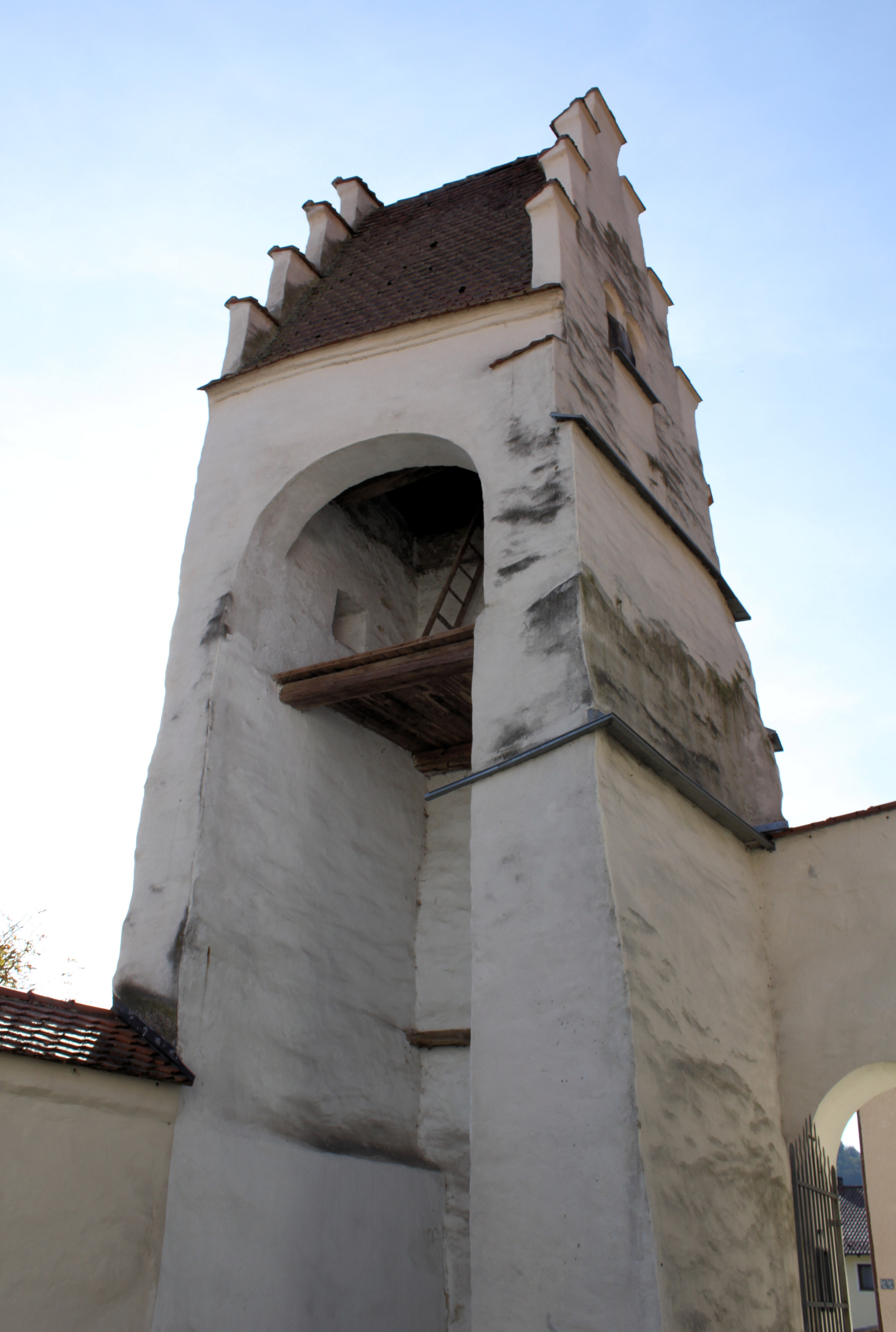 Turm in der äußeren Mauer der Wehrkirche Kinding, Landkreis Eichstätt, Bayern